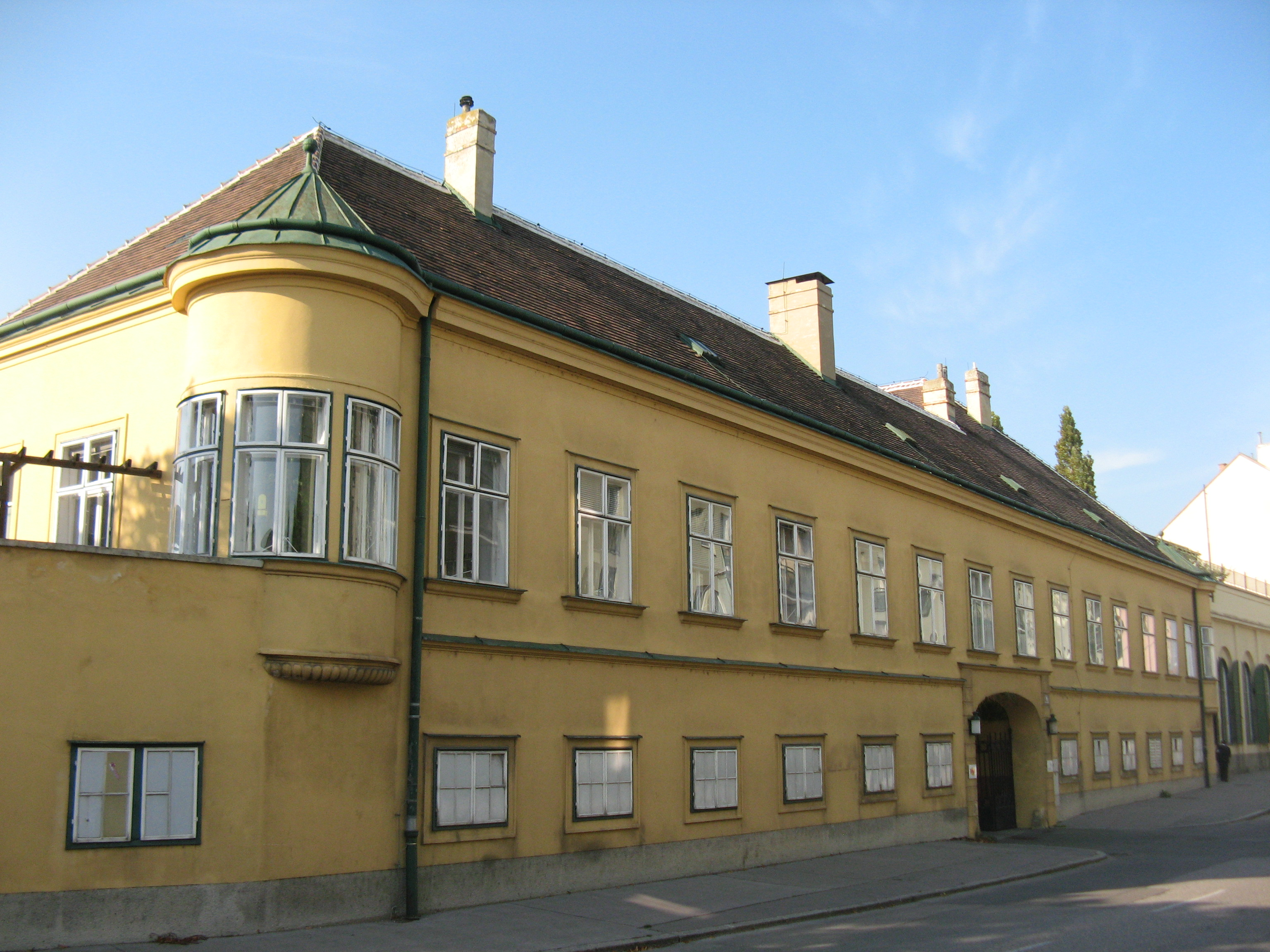 Altes Brauhaus, heute PSD, Brauhausstraße 8, Schwechat